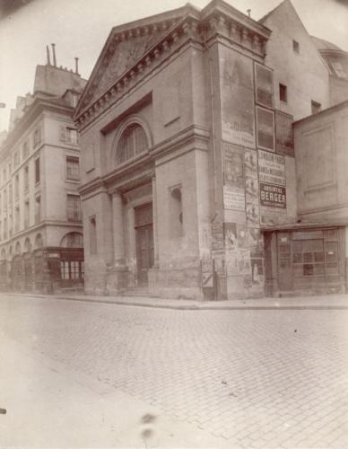 Visitation du faubourg St-Jacques Atget